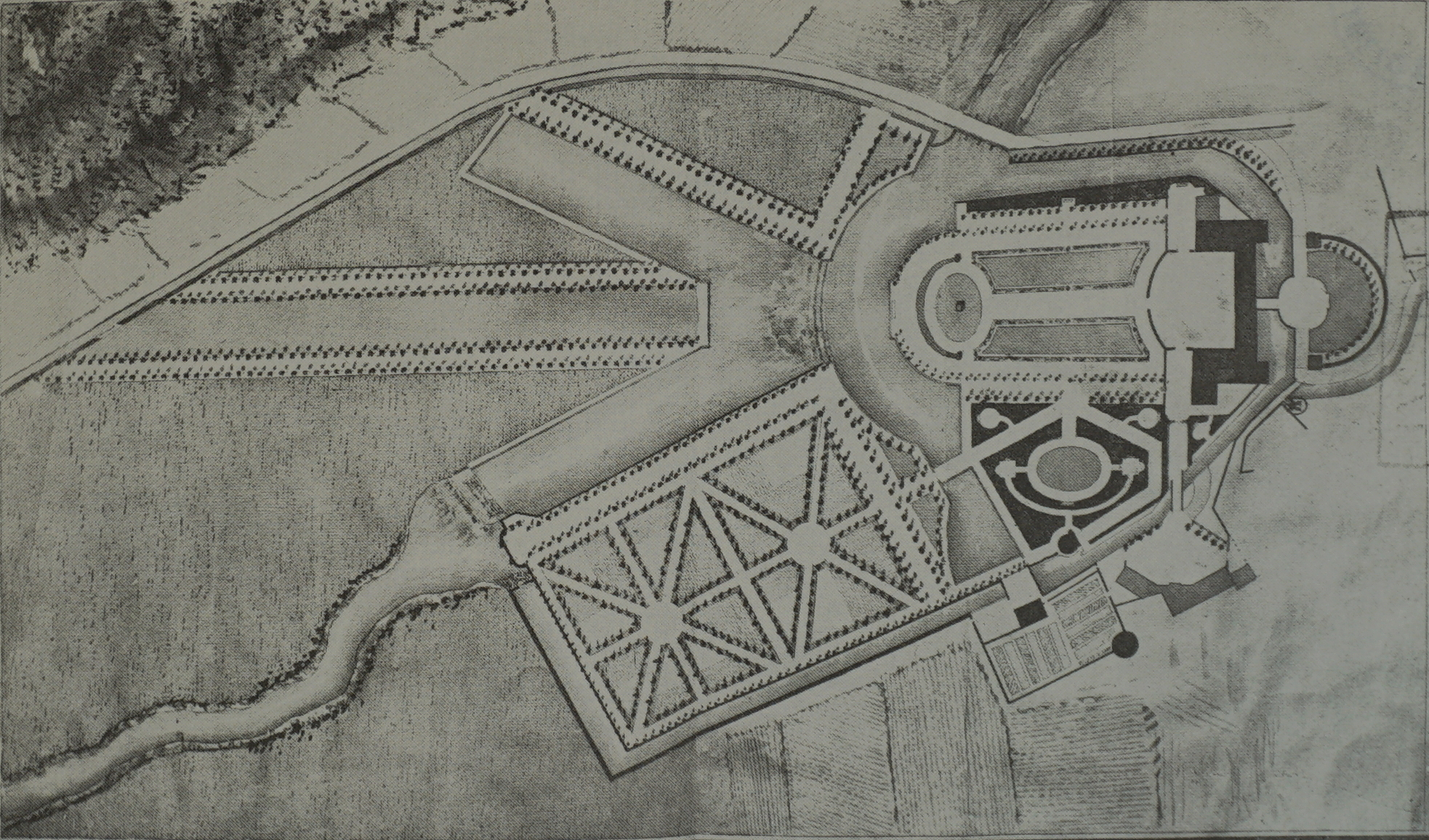 dessin issu du cabinet des estampes.